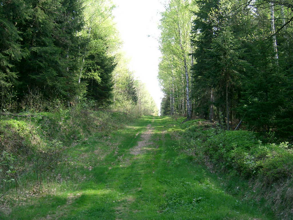 Wanderweg im Zellwald